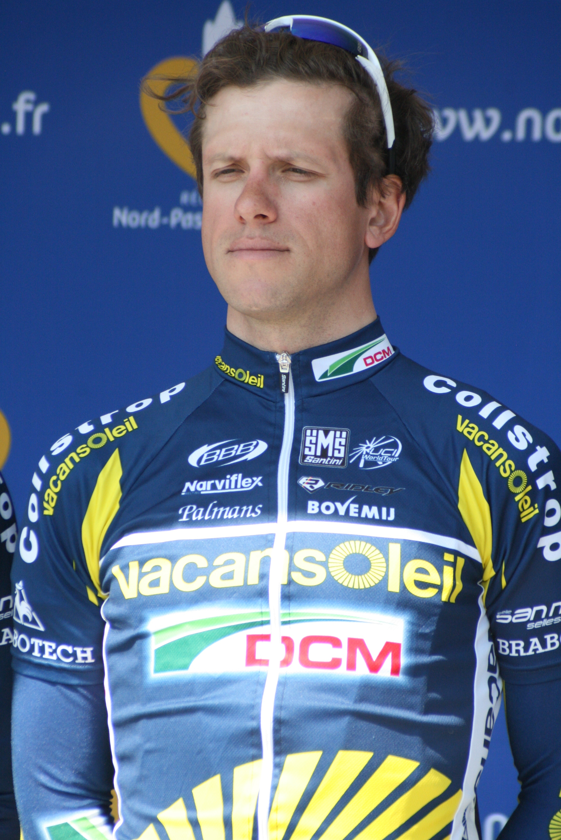 Présentation des coureurs au départ de la première étape Ruslan Pidgornyy